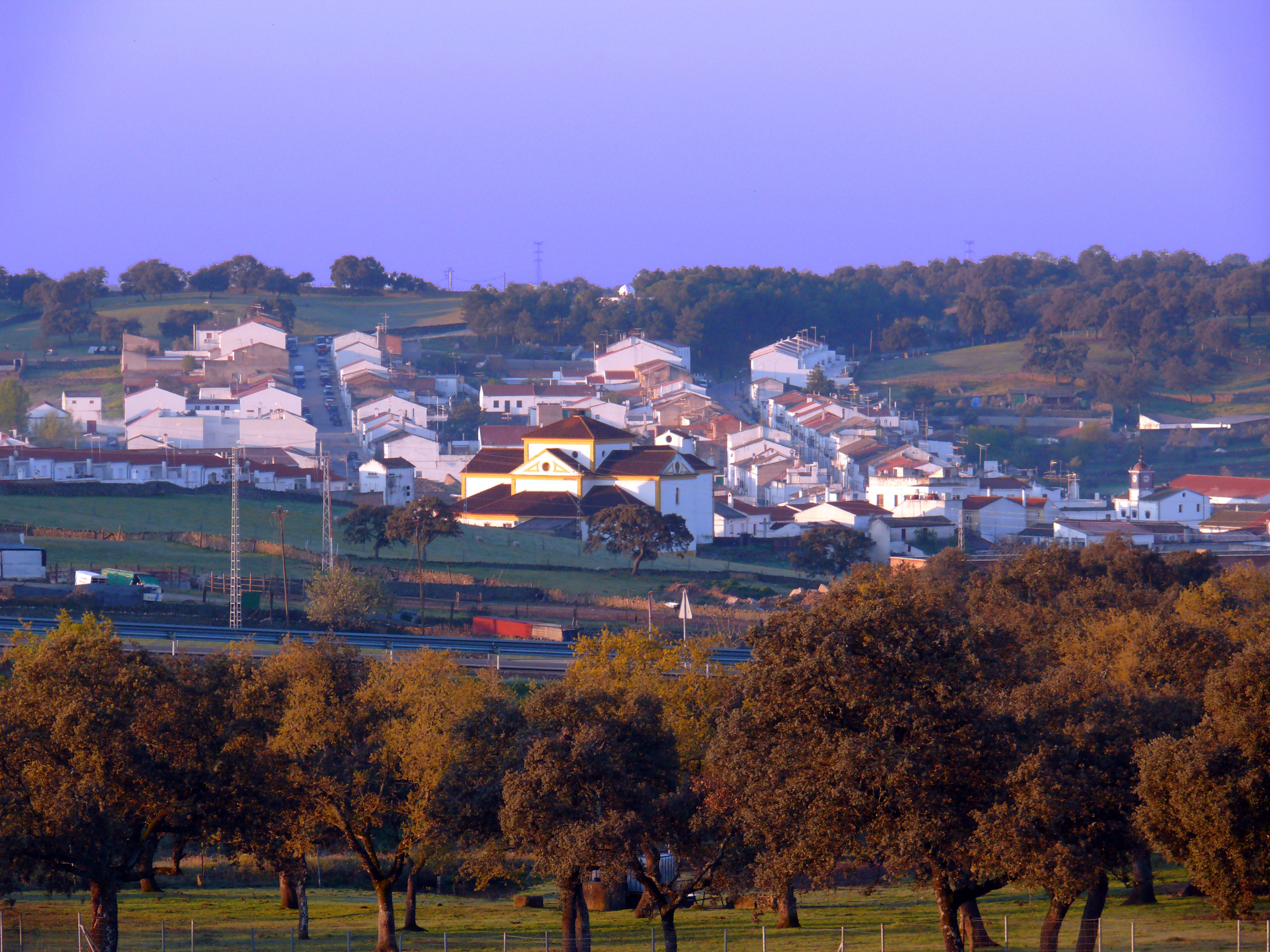 Cardeña al amanecer